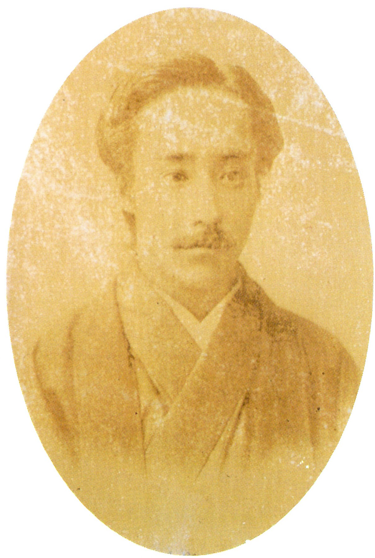 伊東祐帰の肖像写真。